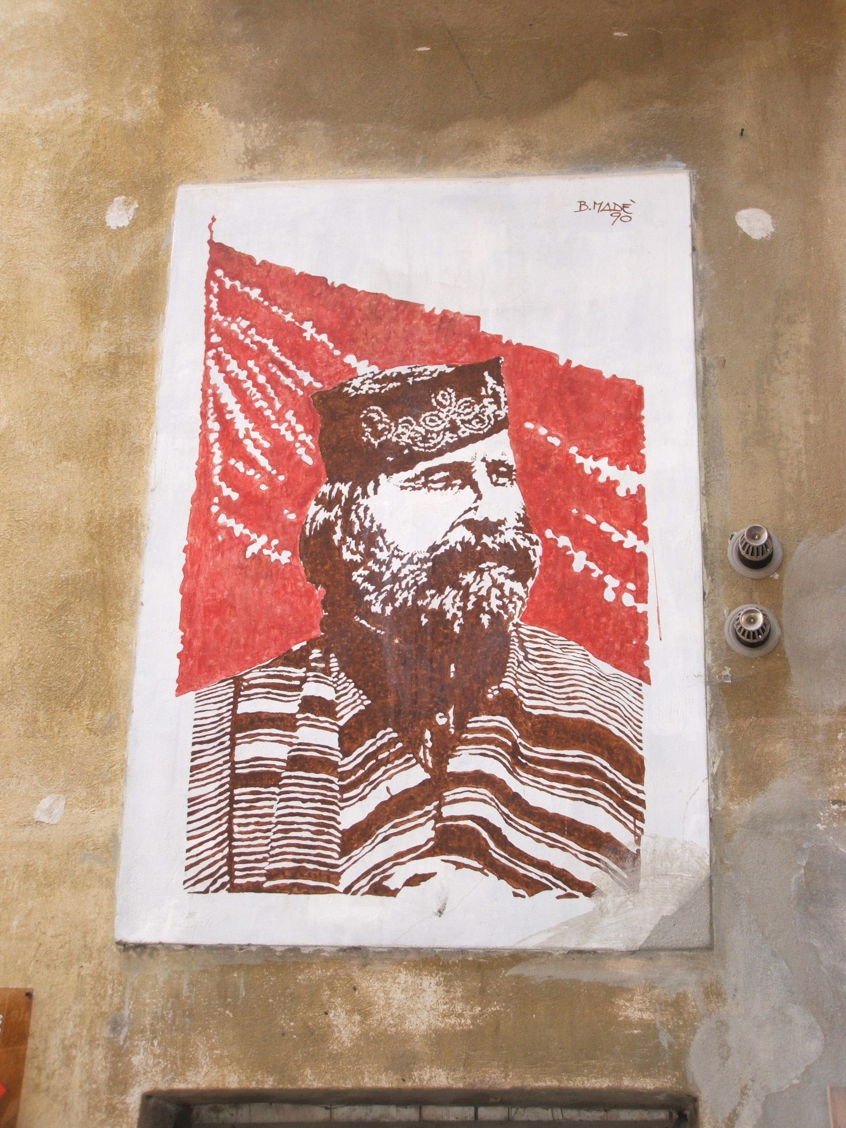 Affresco di Giuseppe Garibaldi su un edificio nel centro storico di Guardabosone, comune della provincia di Biella (Piemonte, Italia)